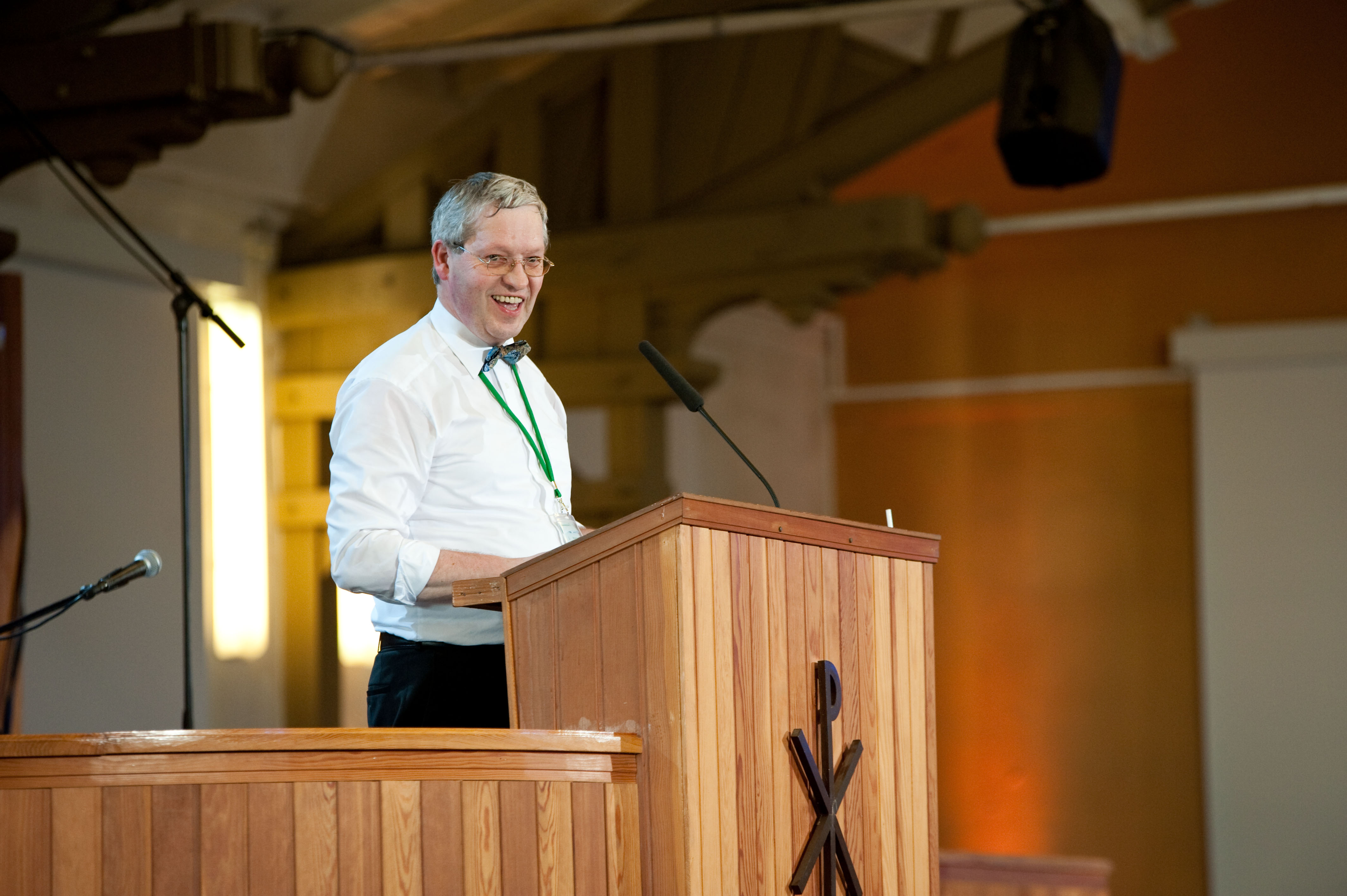 Hartmut Steeb auf der Allianz-Konferenz in Bad Blankenburg im August 2012